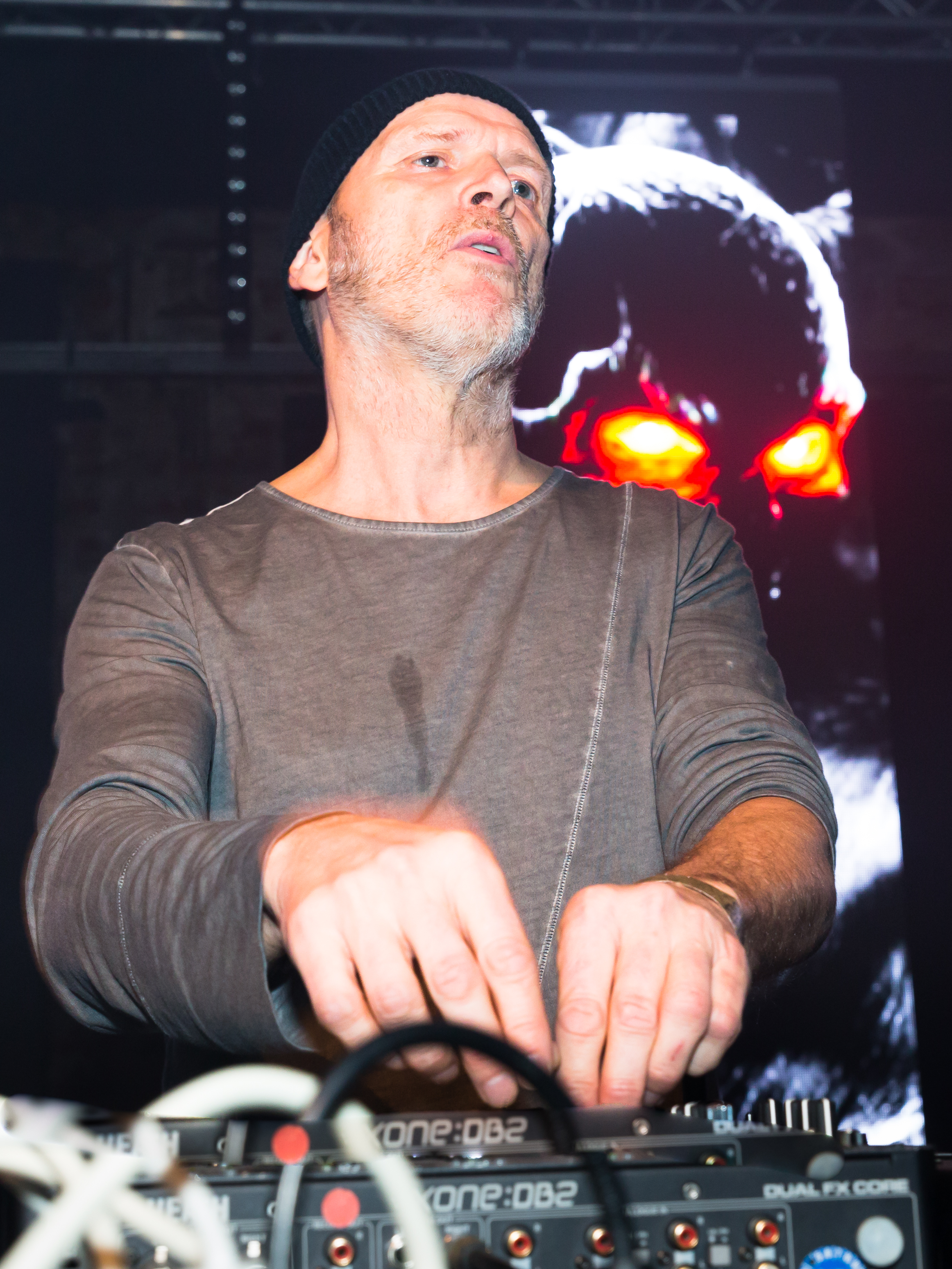 Jam & Spoon (aka Jam El Mar) auf dem 90er Rave, Festival für Technomusik der 90er Jahre. Die Veranstellung fand in der Arena Berlin am 11.02.2017 statt. Dieses Bild wurde mit zustimmung und Akkeditierung des Veranstallter BM Eventagentur UG (haftungsbeschränkt) erstellt.